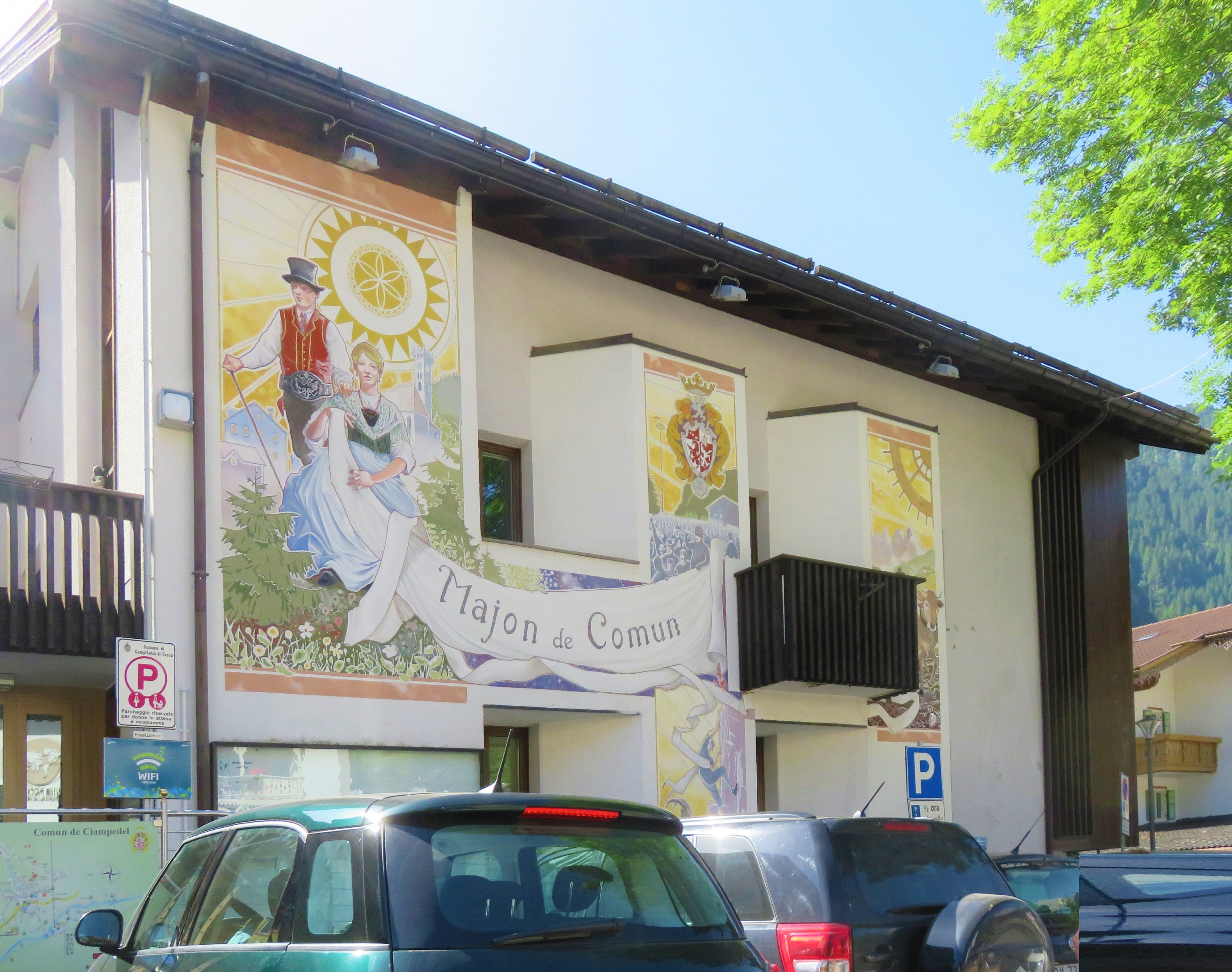 Cèsa de Comun (Casa del Comune) di Campitello di Fassa.